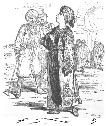 Szene aus Das Märchen vom falschen Prinzen: Der Schneidergeselle Labakan präsentiert sein teuer erspartes Gewand